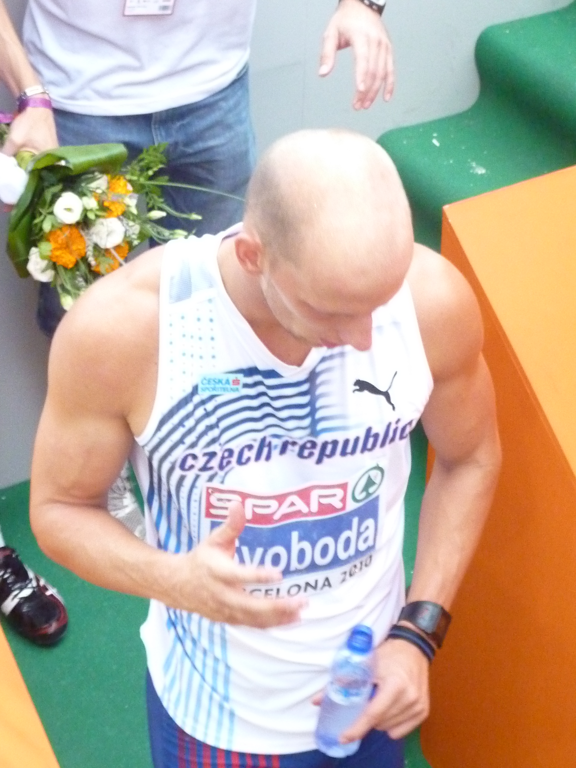 Karel Svoboda